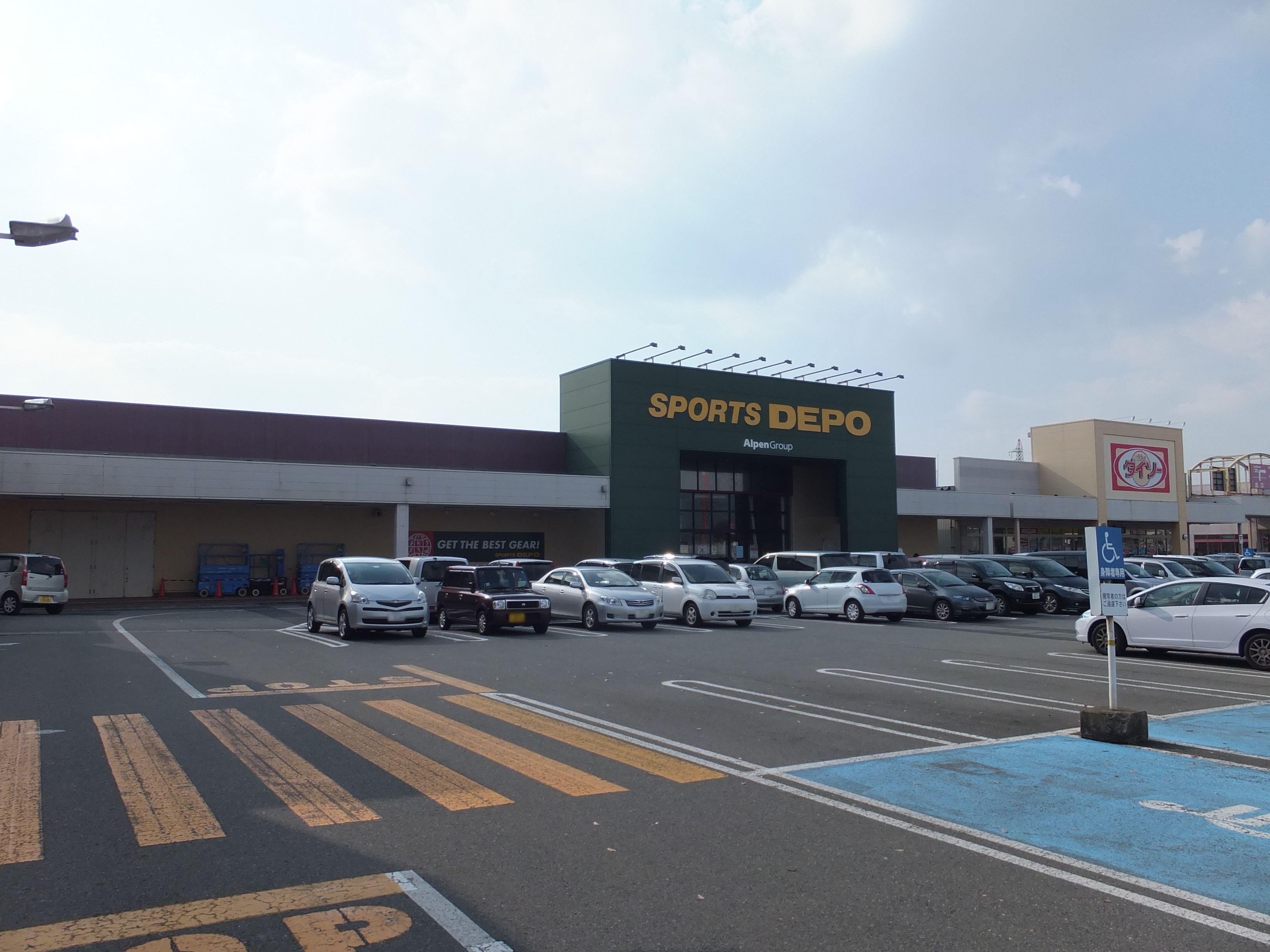 イオンタウン茨島パワーセンター内、スポーツデポ秋田店（秋田市茨島）